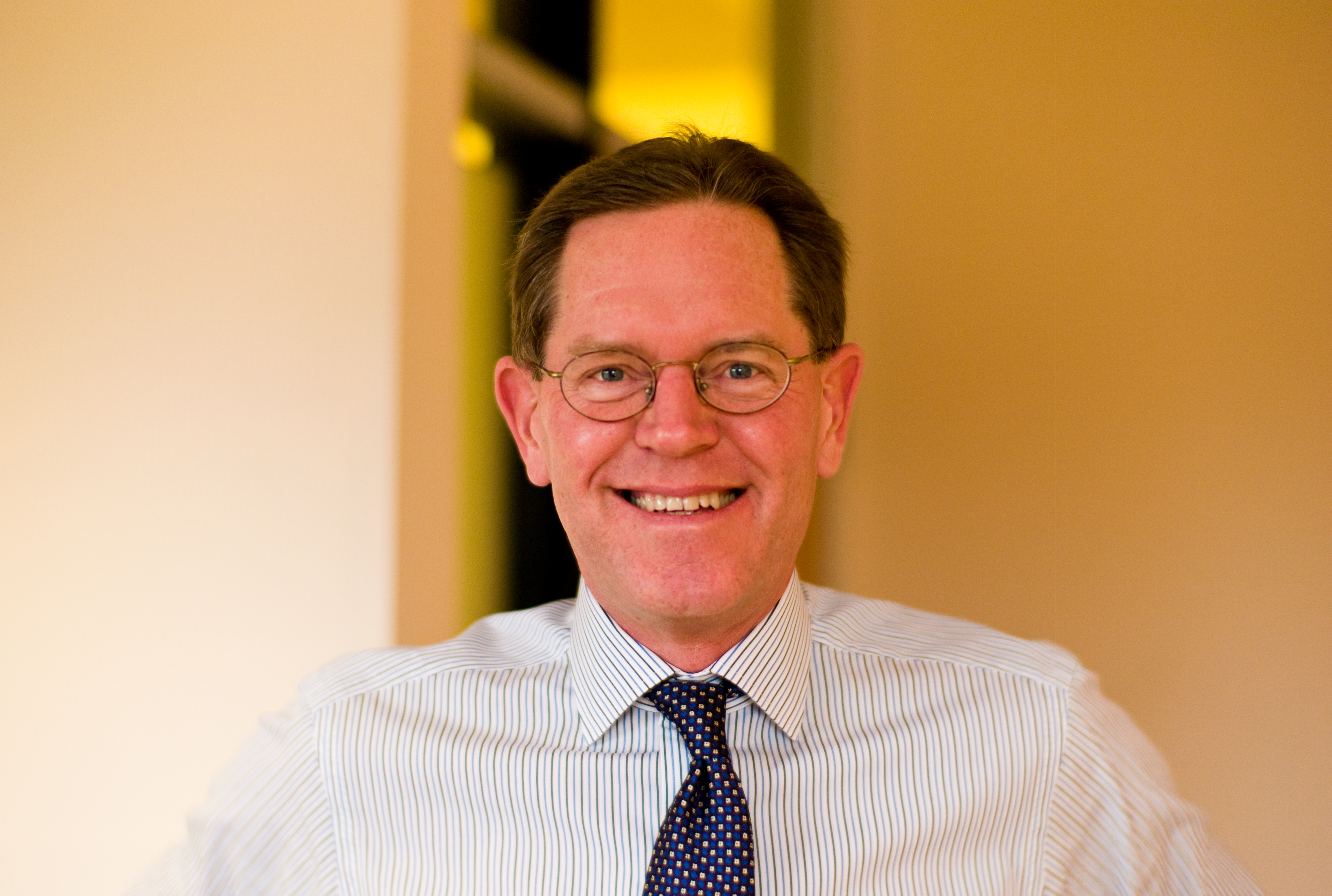 David Marquardt